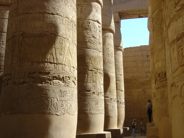 Eigen foto Ben Pirard januari 2007 Karnak